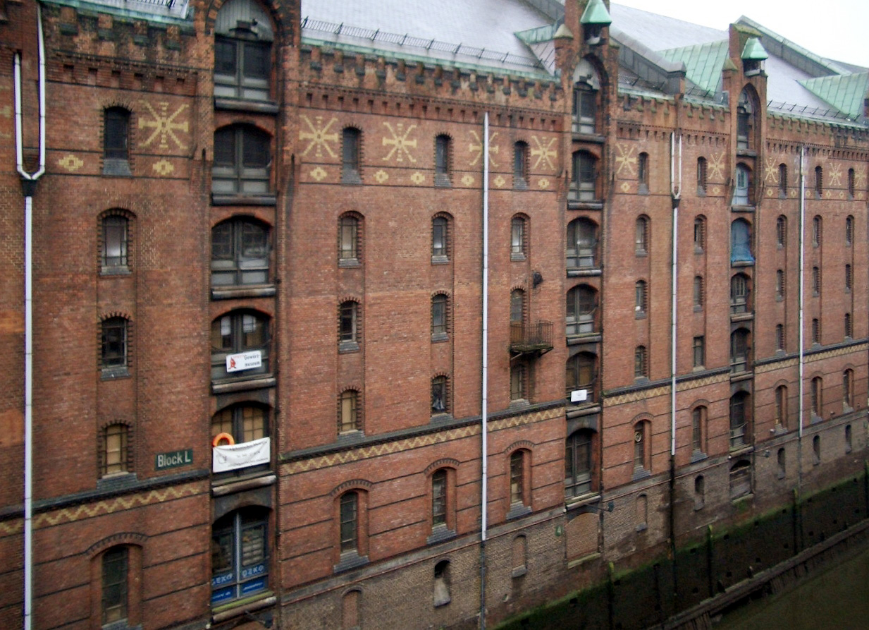 Der historische Speicher am Sandtorkai, Heimat des Afghanischen Museums Hamburg und des Gewürzmuseums This is the photograph of an architectural monument. It is part of the list of cultural monuments of Hamburg, no. 968